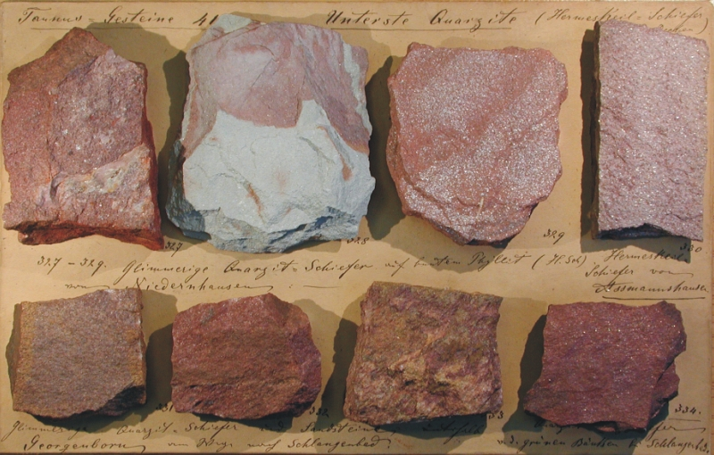 Carl Koch, Sammlung, collection, Museum Wiesbaden, Landesgeologe Hessen, Deutschland